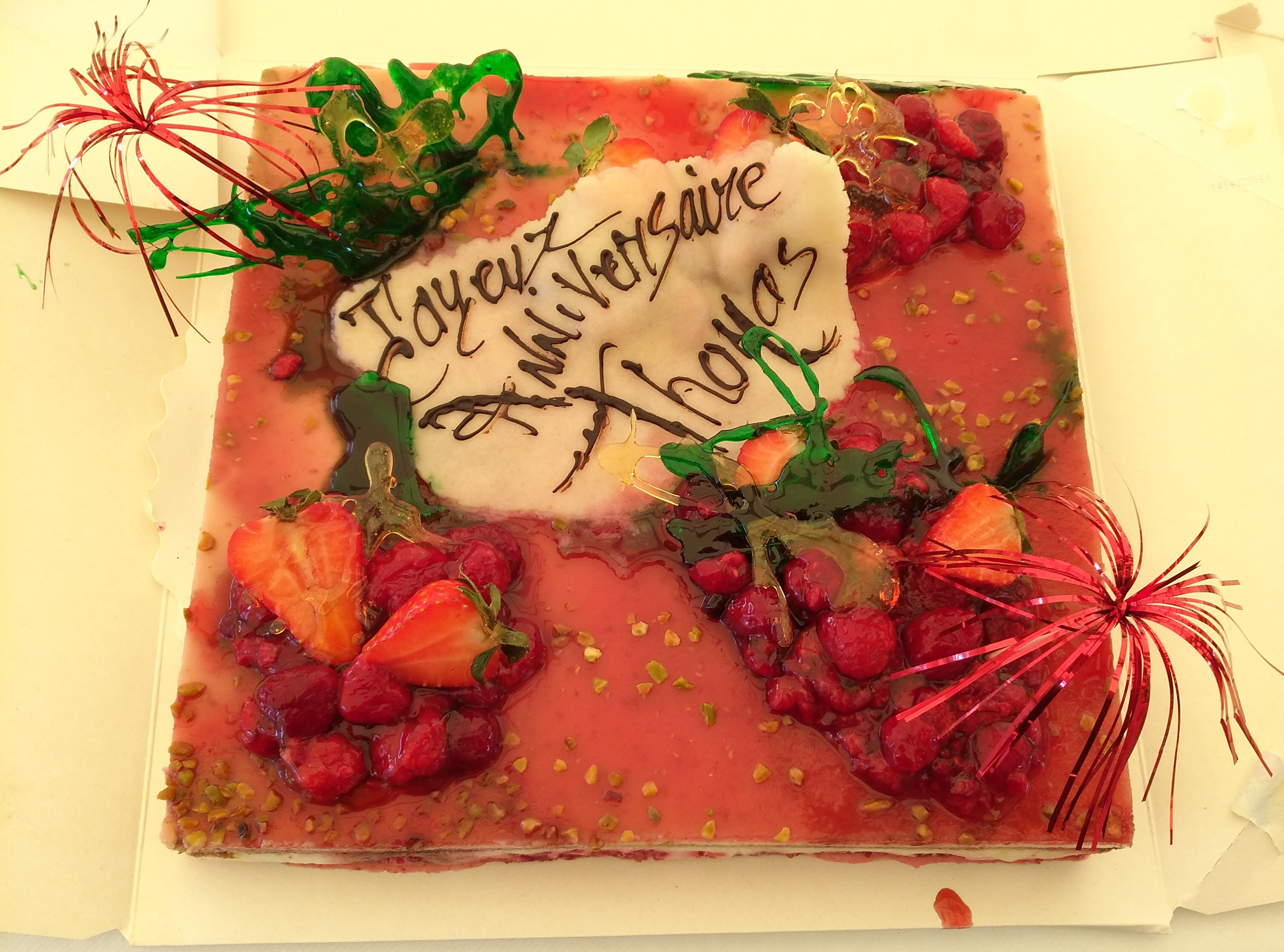 Framboisier signé "Joyeux Anniversaire Thomas" au chocolat noir.